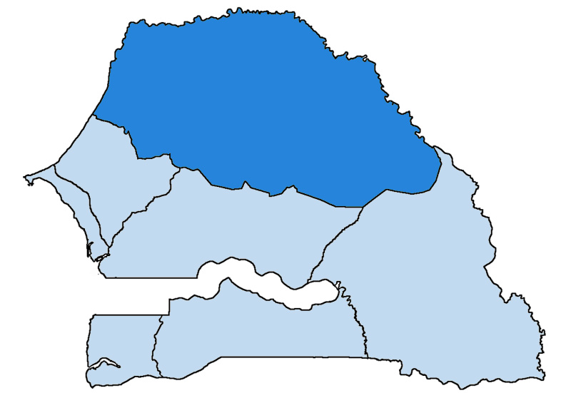 Mappa della diocesi cattolica di Saint-Louis-du-Sénégal, in Senegal. Anno 2009.